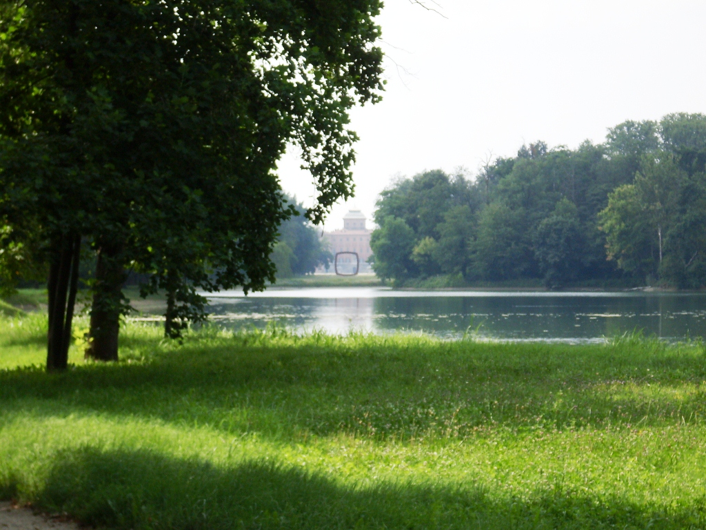 Grande lago e castello di Racconigi visti dal sentiero che conduce alla Margarie